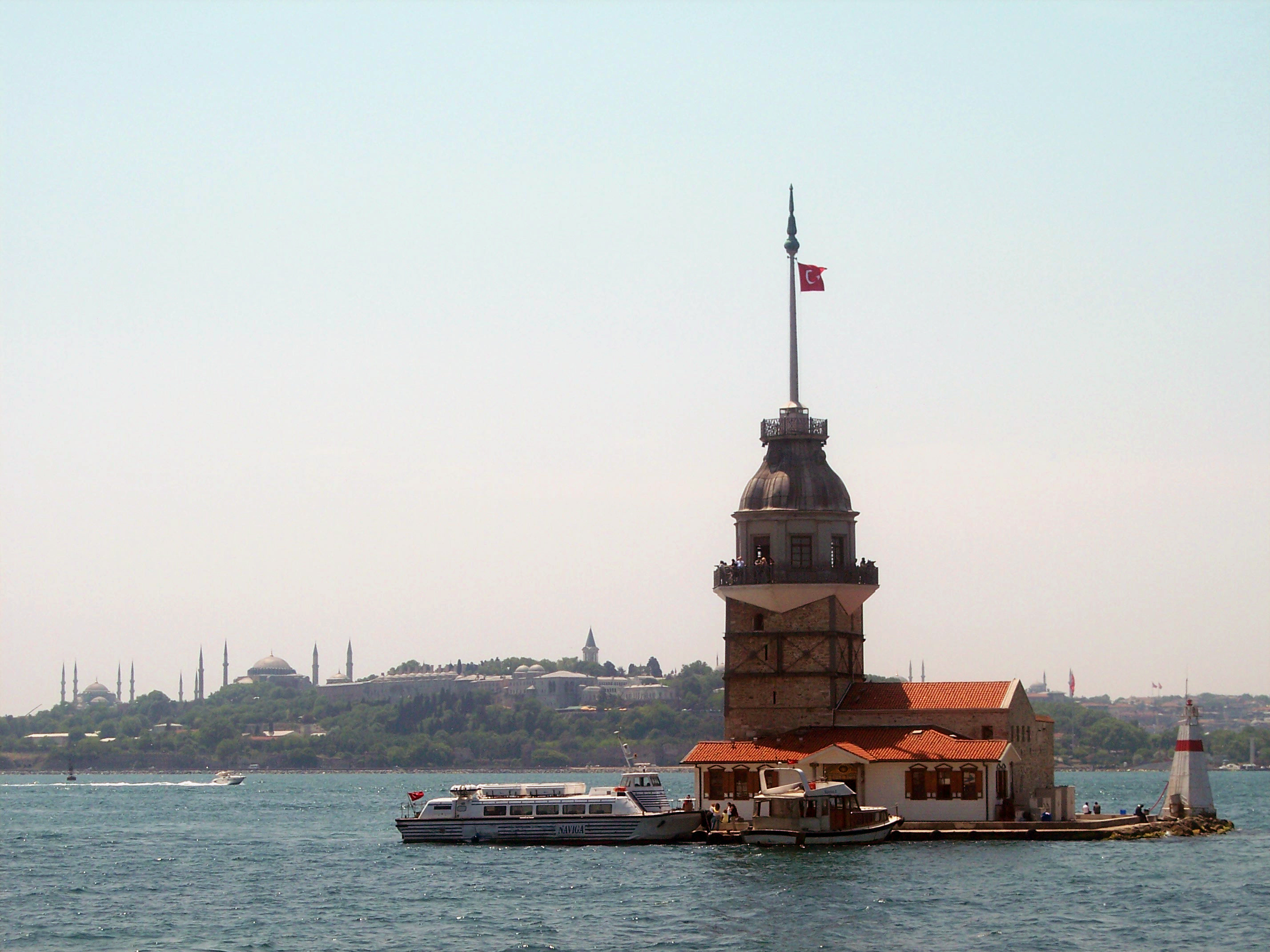 Maiden's Tower - "Kız Kulesi" in Turkish. Istanbul/Turkey.